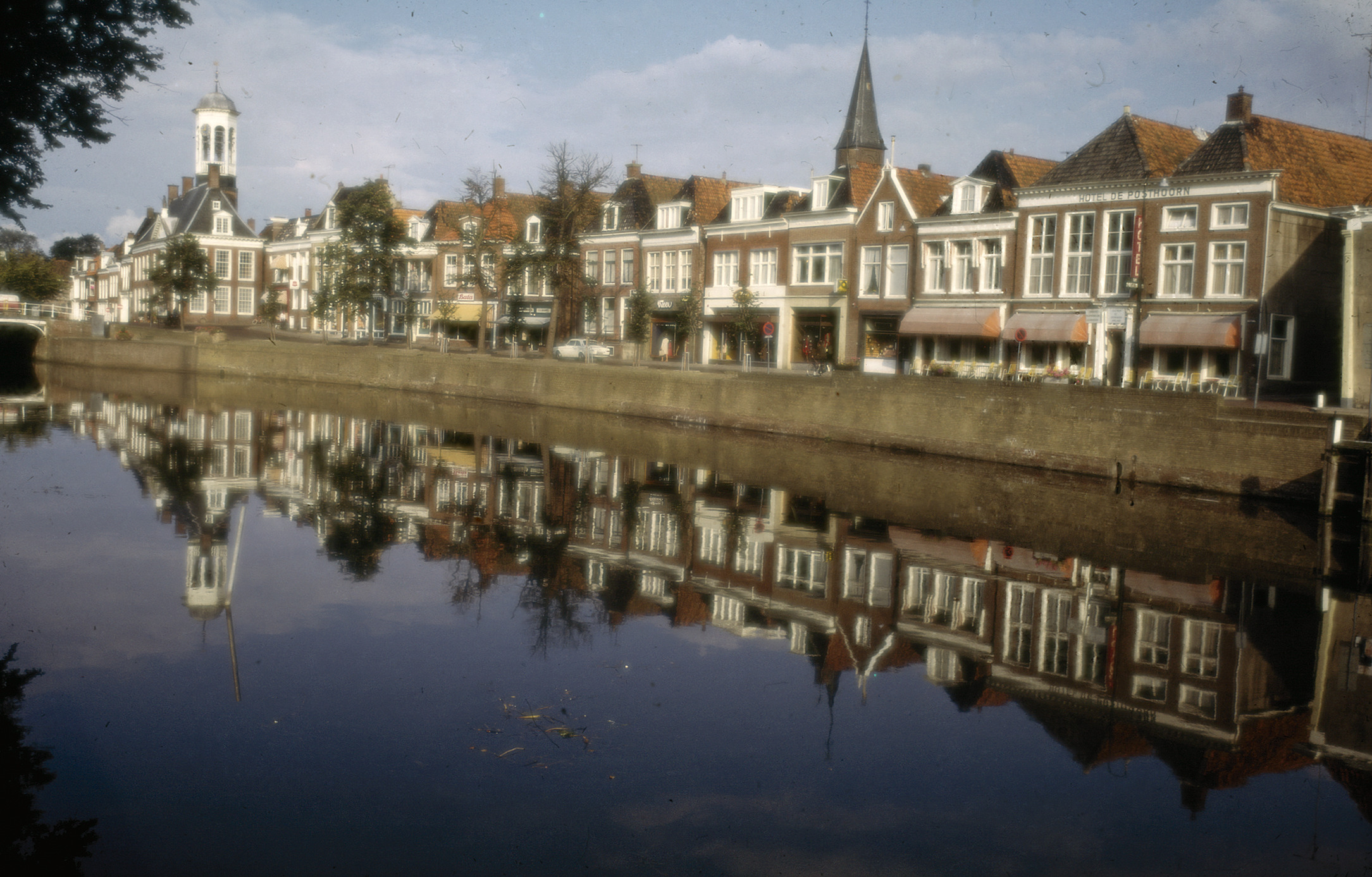 Exterieur OVERZICHT VOORGEVELS This is an image of rijksmonument number 13110 This is an image of rijksmonument number 13109 This is an image of rijksmonument number 13108 This is an image of rijksmonument number 13107